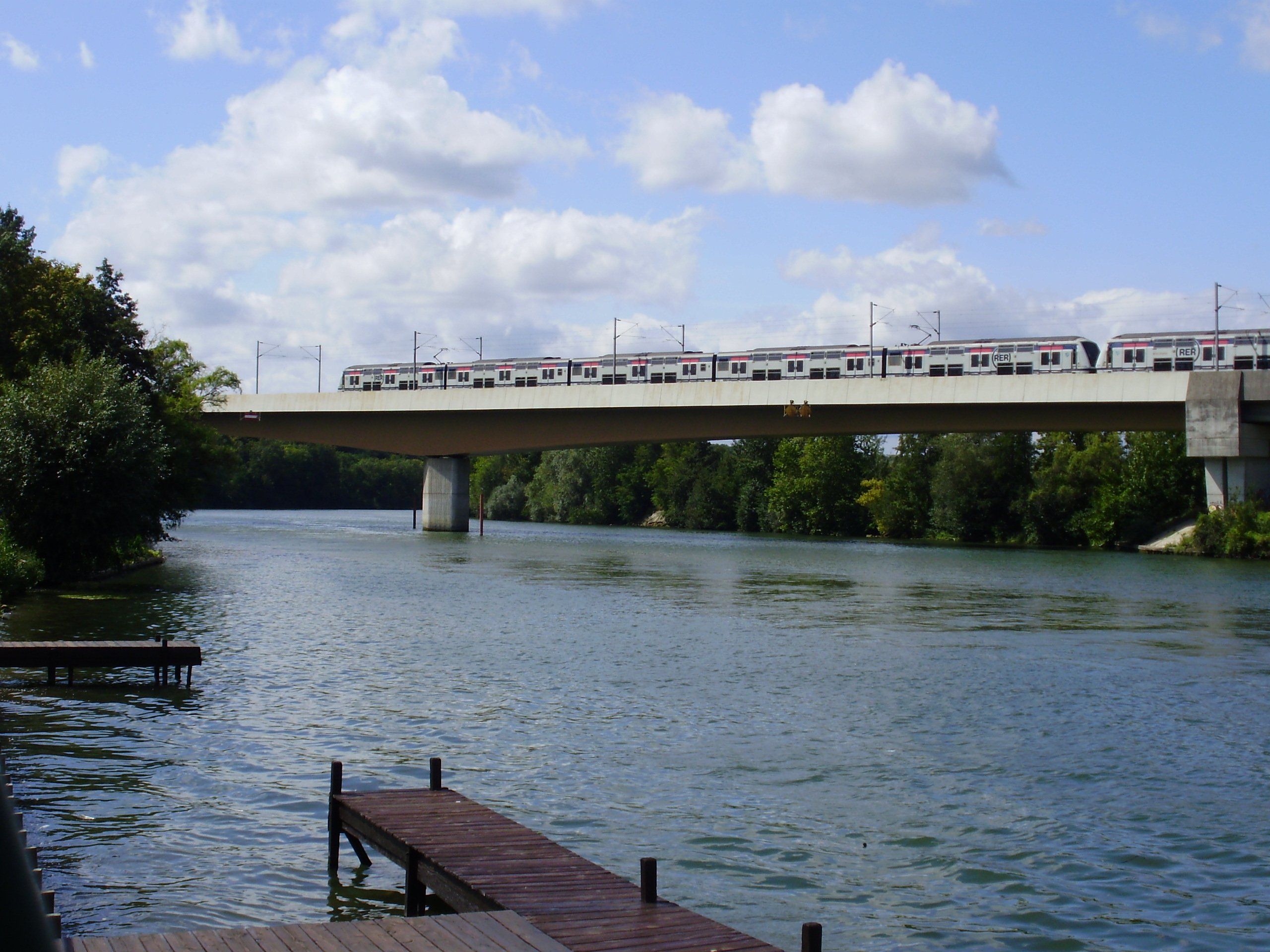 Viaduc ferroviaire d'Éragny, Val-d'Oise, France : vue du viaduc depuis le chemin de halage, en regardant vers l'aval, avec une rame Altéo se dirigeant vers Paris (à gauche de la photo)